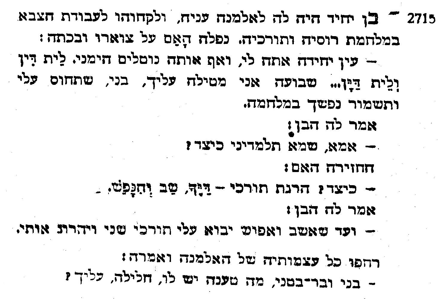 אלתר דרויאנוב, ספר הבדיחה והחידוד, בדיחה מספר 2715